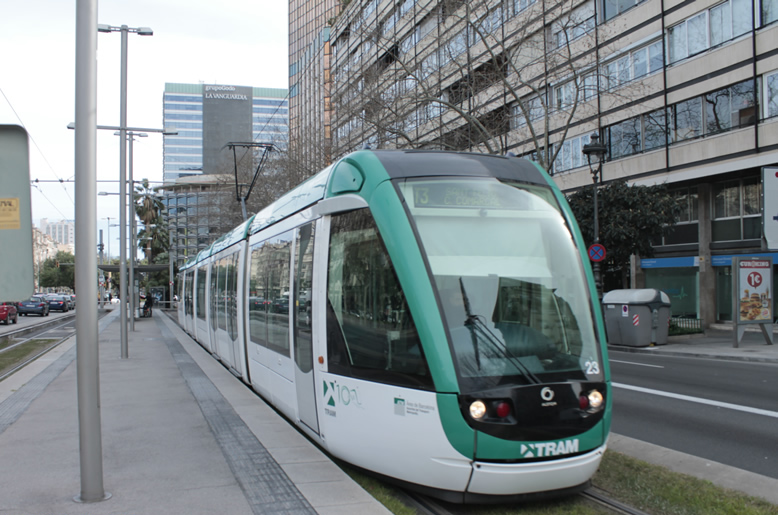 Tranvía de Barcelona en la estación de Francesc Macia, inicio de líneas T1, T2 y T3 en la Avenida Diagonal